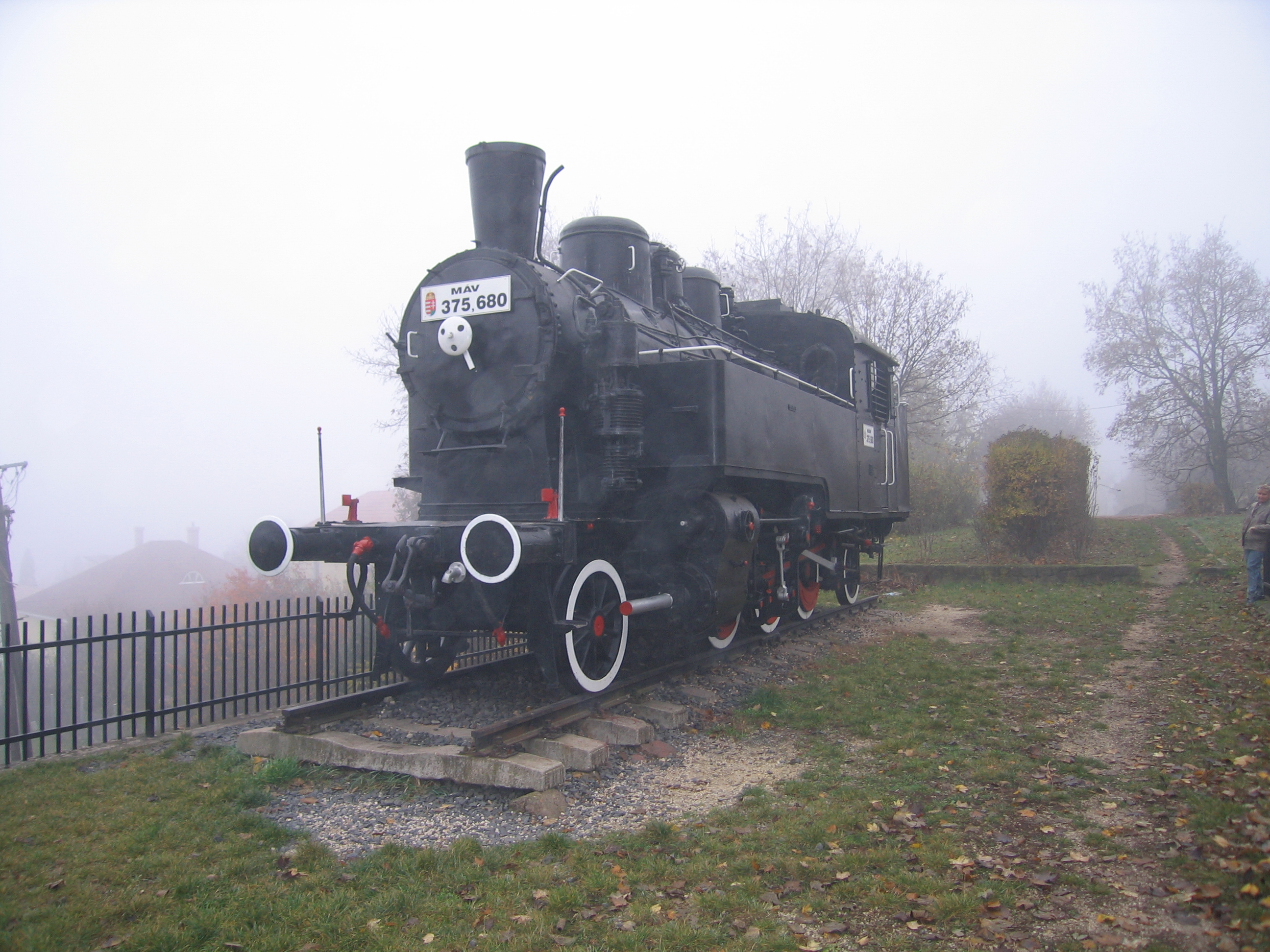 A MÁV 375.680 sorozatszámú kiállított mozdonya Balatonalmádiban, a megszűnt Alsóörs-Veszprém vasútvonal emlékére.